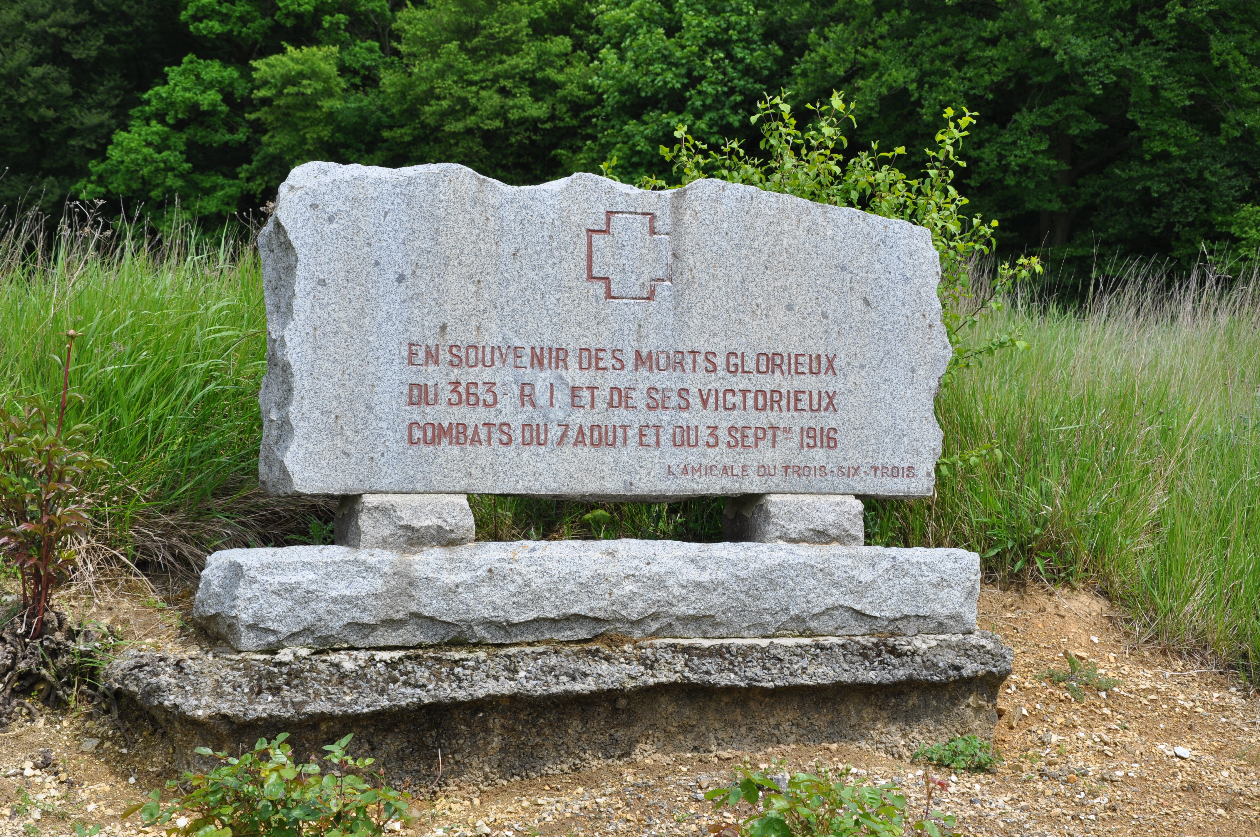 Souvenir 363ème R.I. à Cléry-sur-Somme